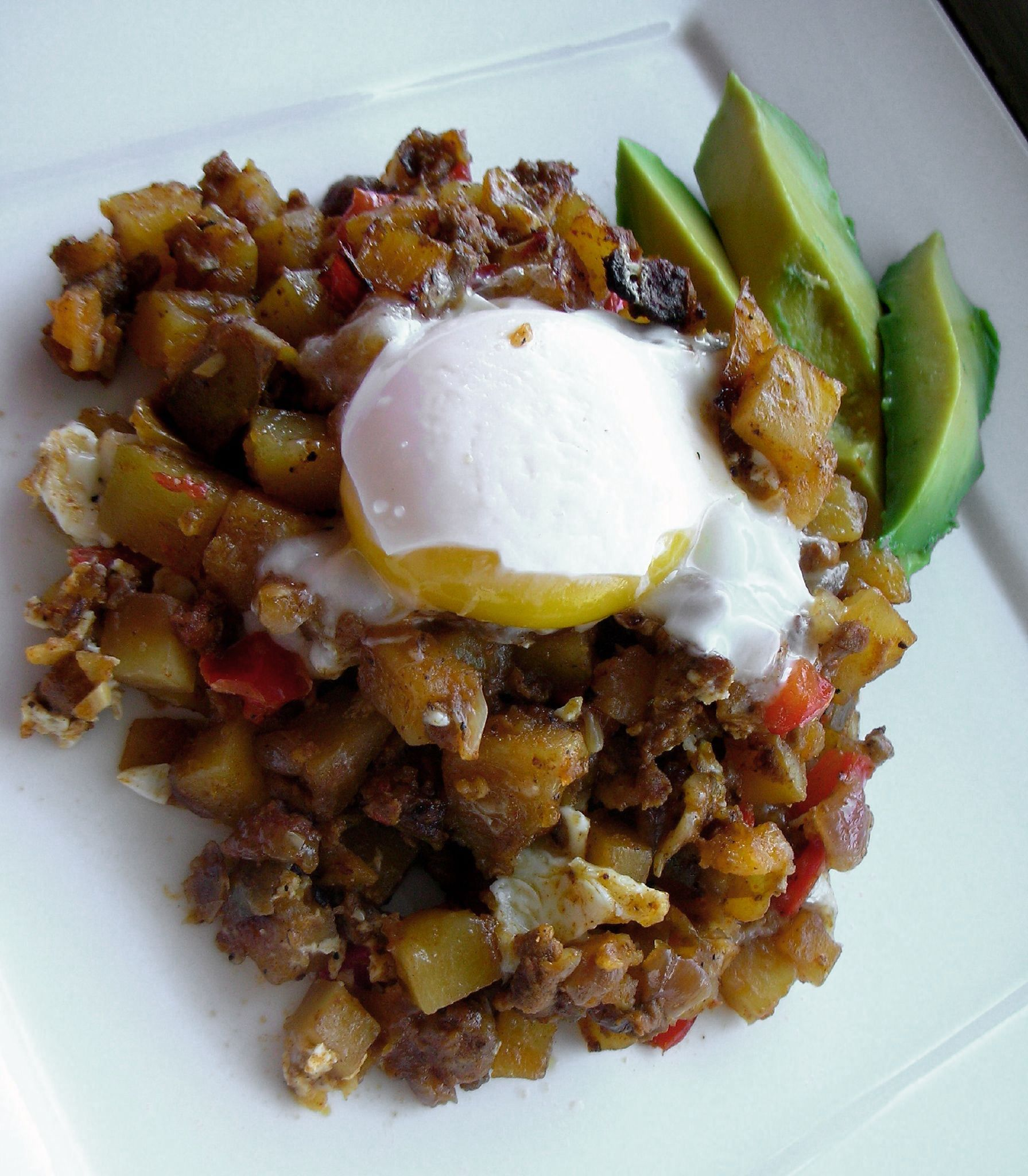 Coddled egg topping Yukon Gold hash